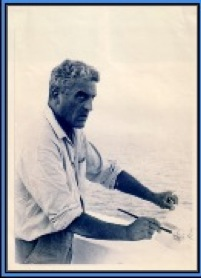 Vincenzo Bianchini, medico, pittore, filosofo (1903-2000) di Bianchini Bianchini's picture family - da famiglia Bianchini